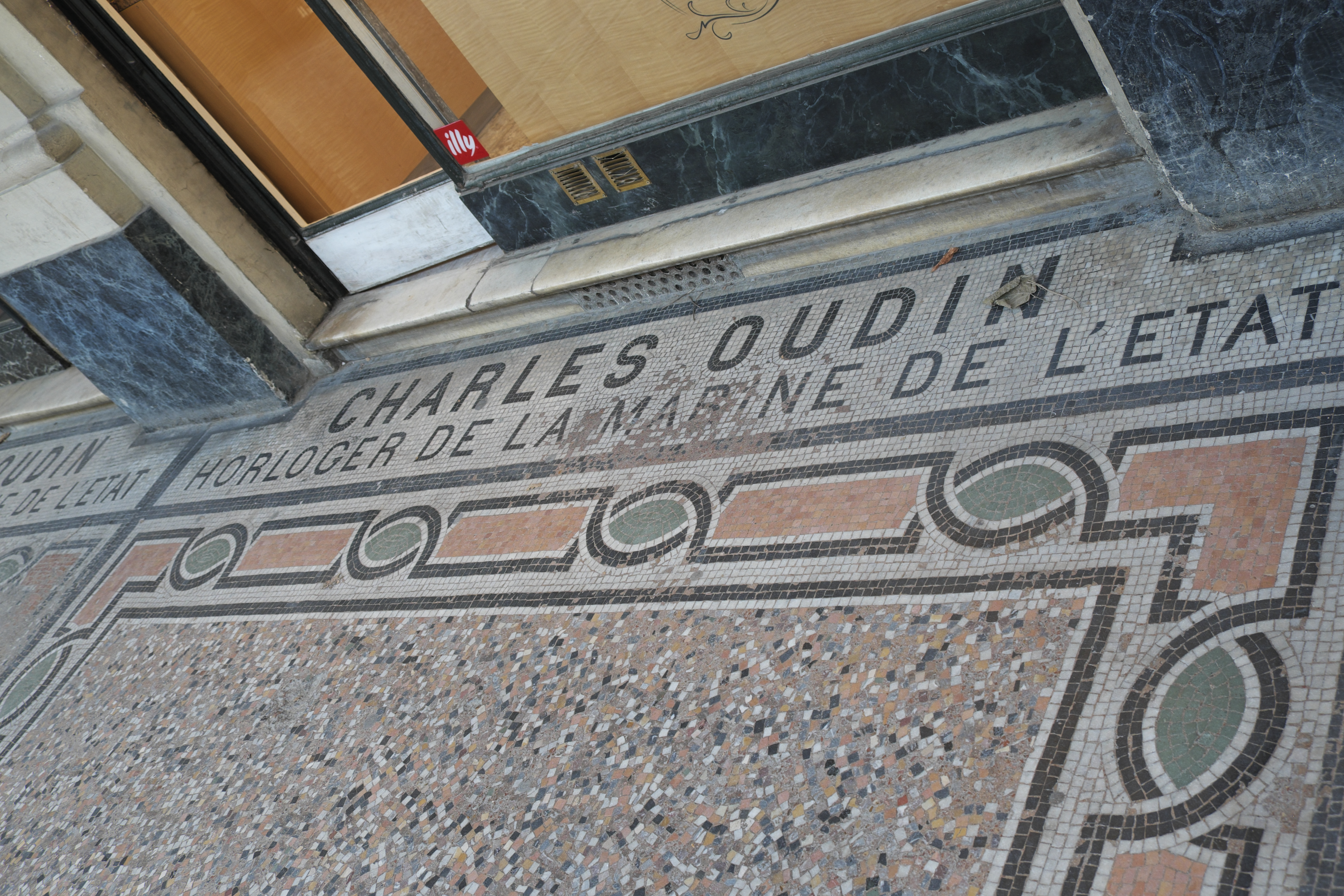 Palais Royal im 1. Arrondissement von Paris, Mosaikfußboden, Inschrift: Charles Oudin Horloger de la Marine de l'État